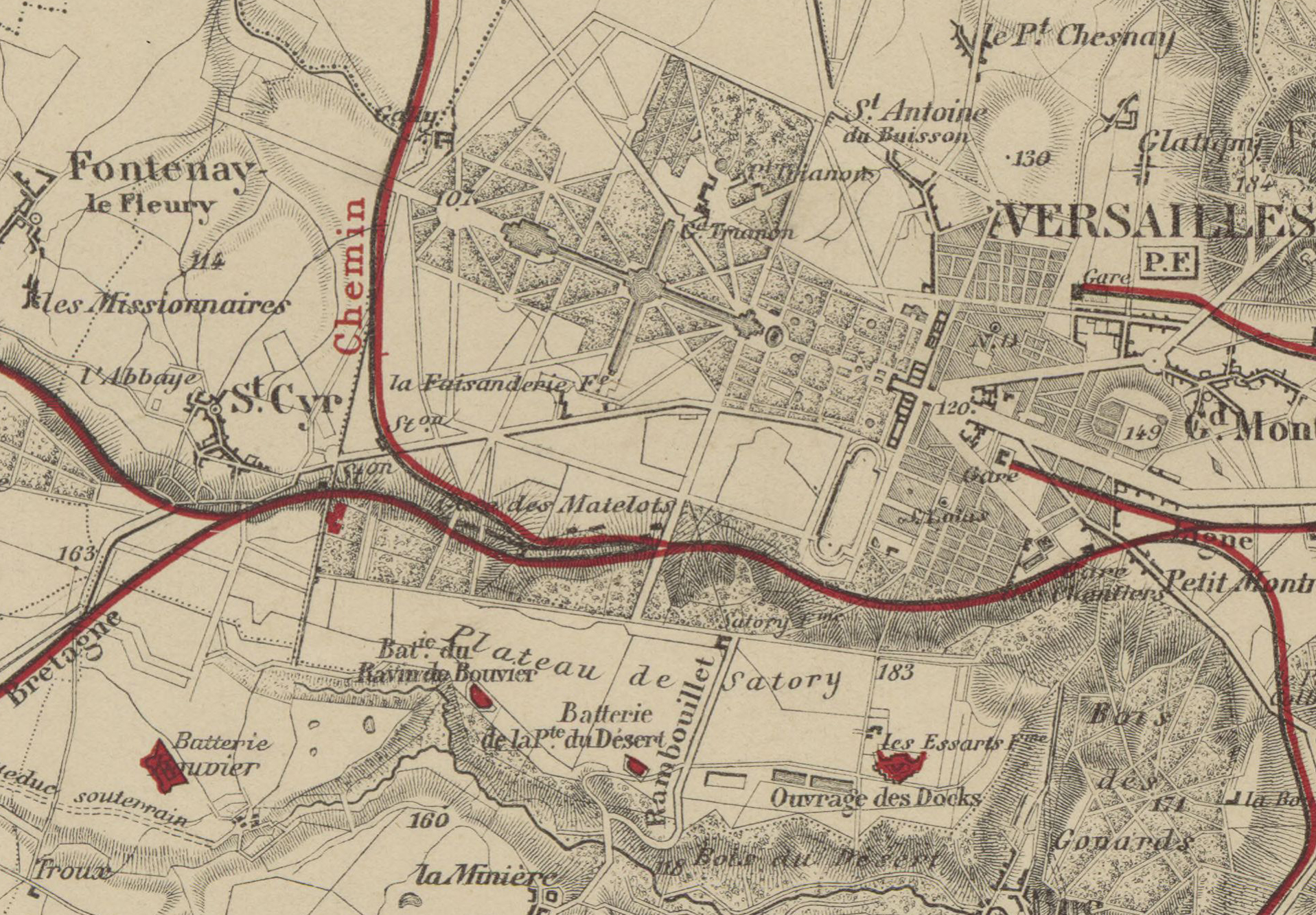 Détail carte "Environs de Paris. Lignes de l'Ouest et de grande ceinture" avec la situation de la Gare des Matelots (gare de Versailles-Matelots), position géographique et ferroviaire.